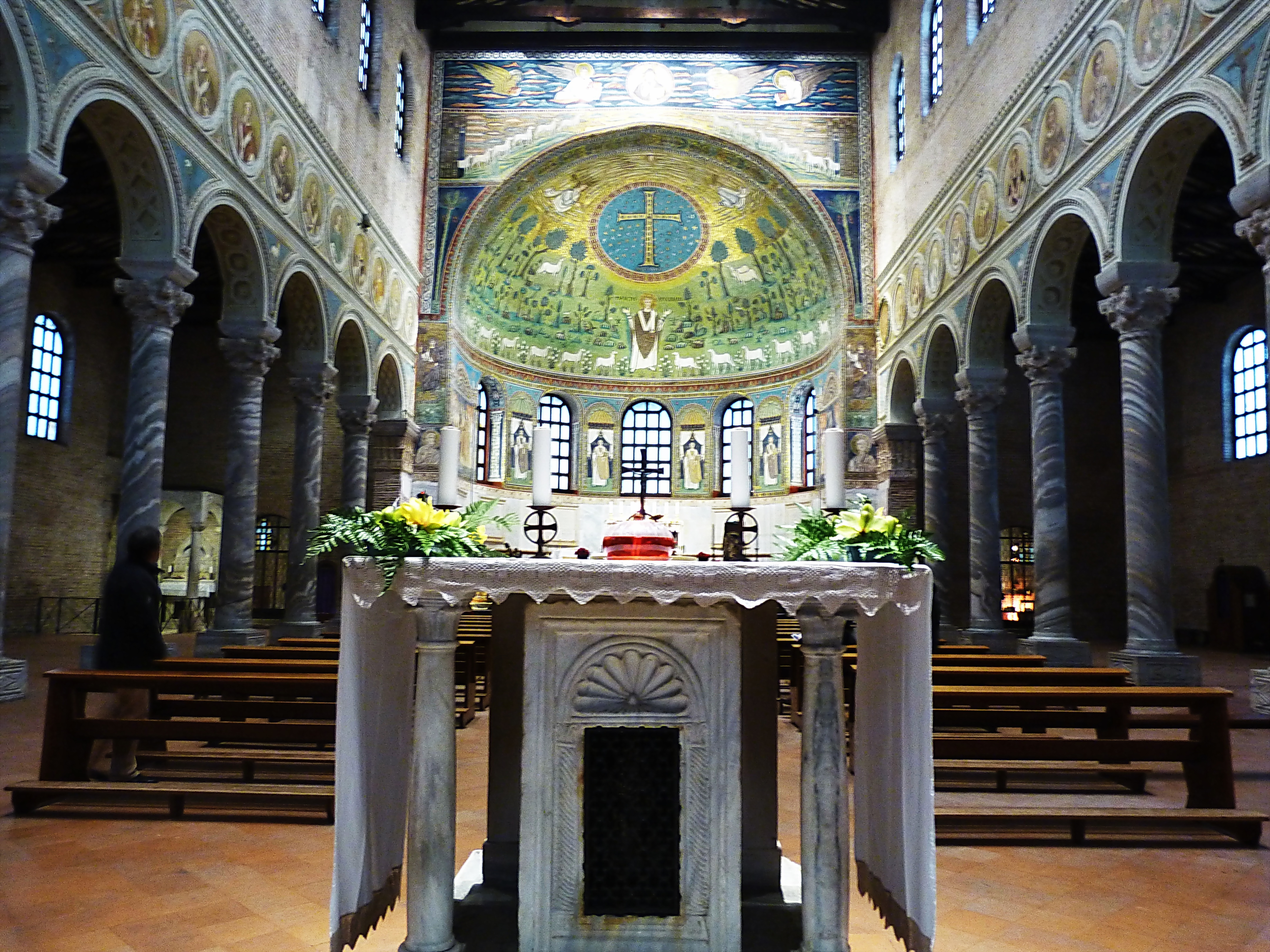 Basilica di Sant'Apollinare in Classe This is a photo of a monument which is part of cultural heritage of Italy.